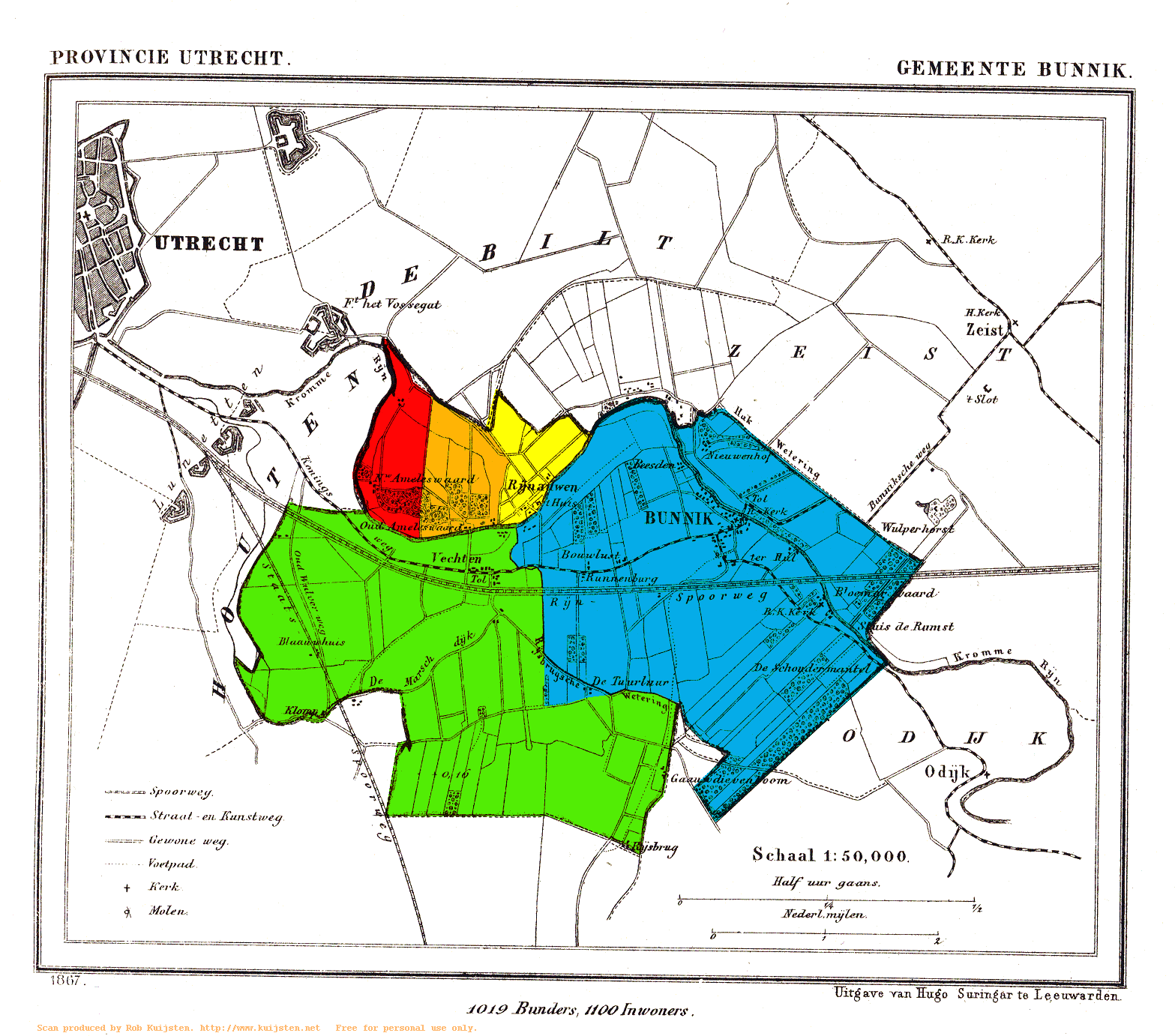 Map of Bunnik, showing the fiefdoms (heerlijkheden) before 1795: Nieuw Amelisweerd (red), Oud-Amelisweerd (orange), Rhijnauwen (yellow), Vechten (green), Bunnik (blue).